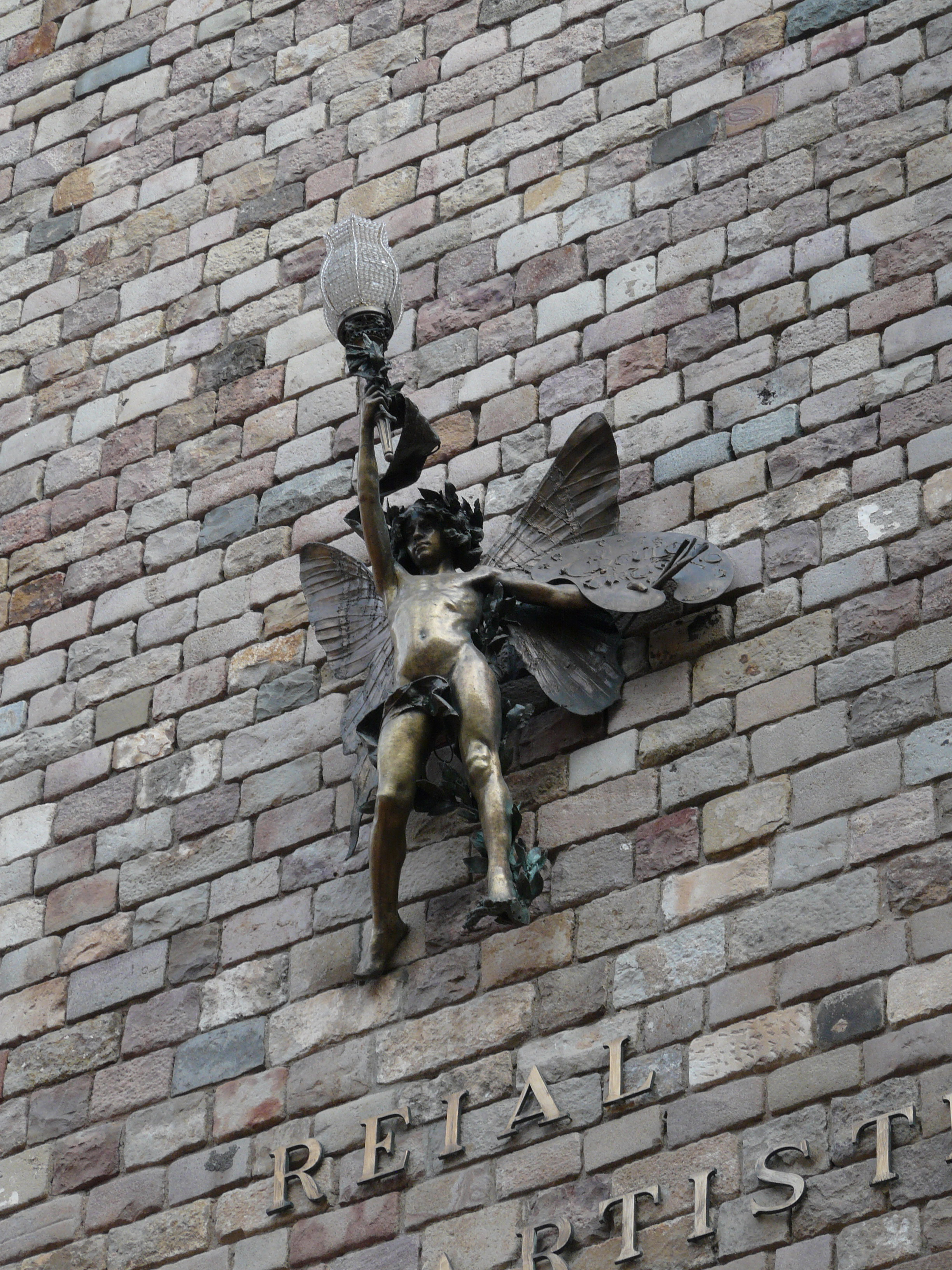 Casa Bassols (Barcelona)